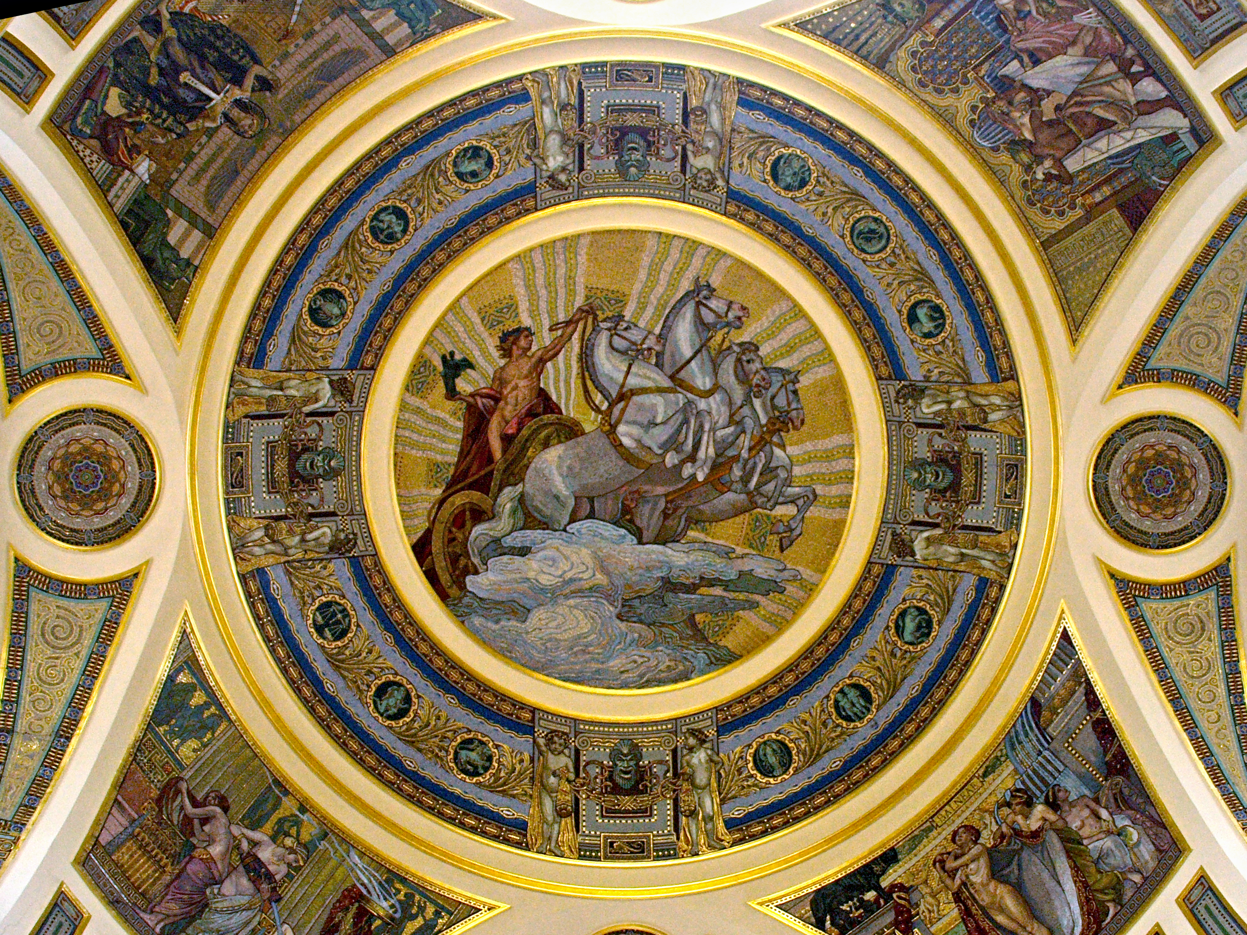 Budapest (Hongrie) - Coupole des Bains Széchenyi fürdő